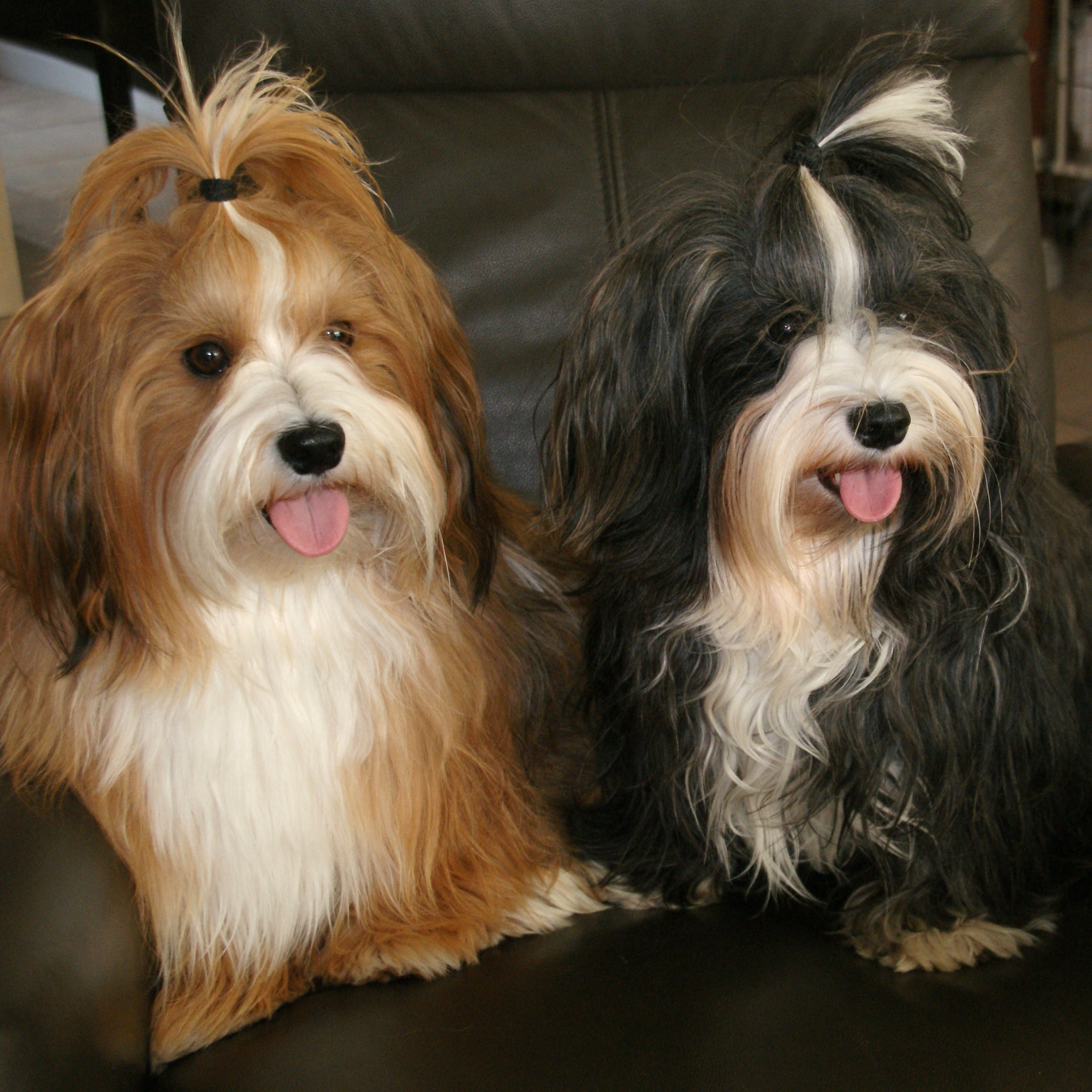 links : Reu / Rechts Teefje